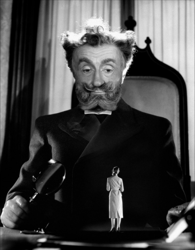 Noël-Noël nell'episodio "Pigrizia" de I 7 peccati capitali (1952)